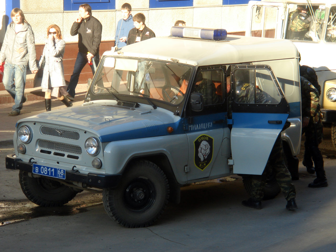 Автомобиль УАЗ тамбовского ОМОНа на Марше несогласных в Нижнем Новгороде.